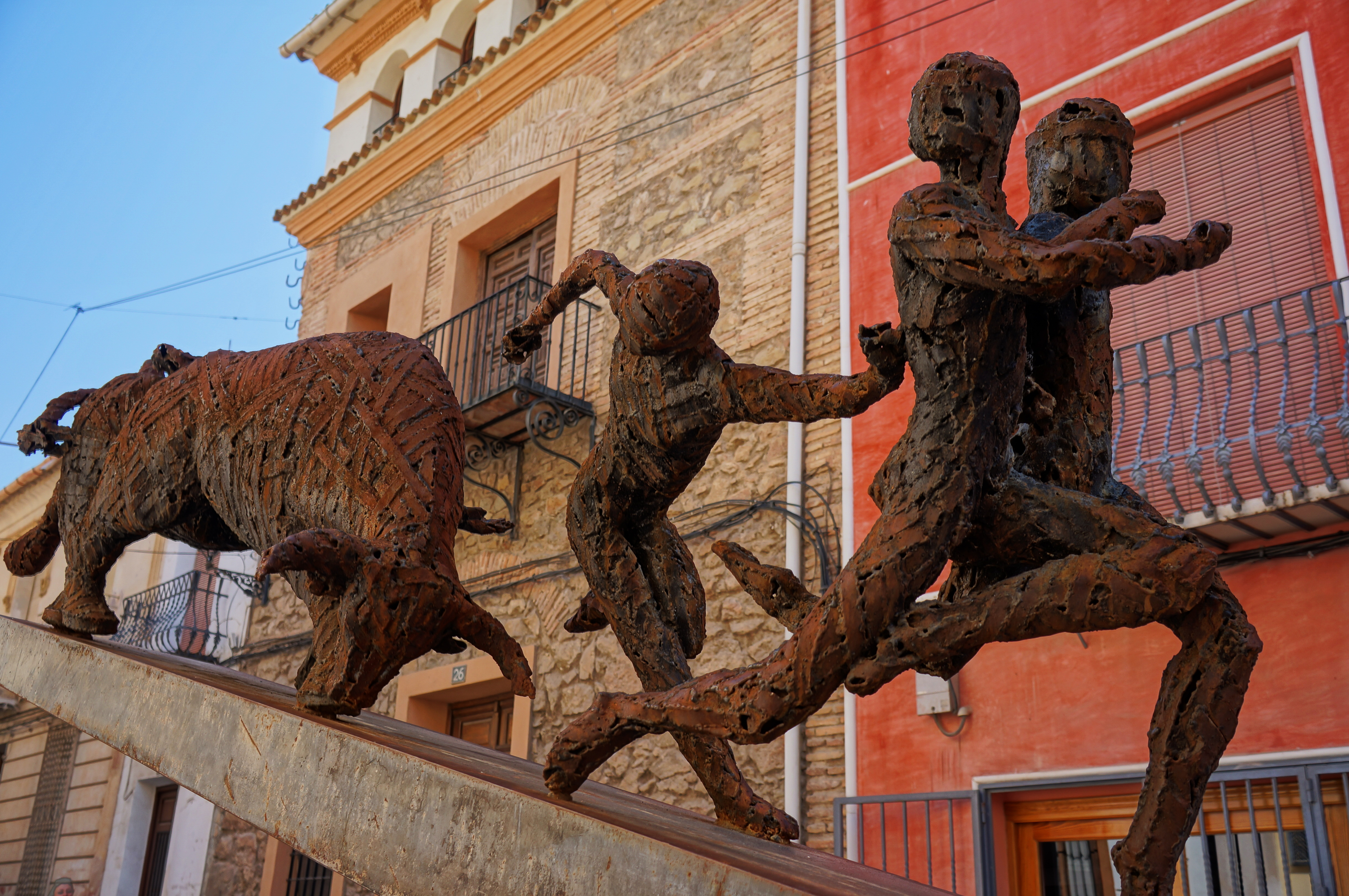 "Encierro" - Miguel Canseco - Blanca (Murcia, España)